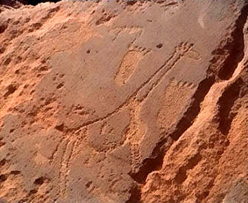 Steingravuren bei Twyfelfontein, Namibia